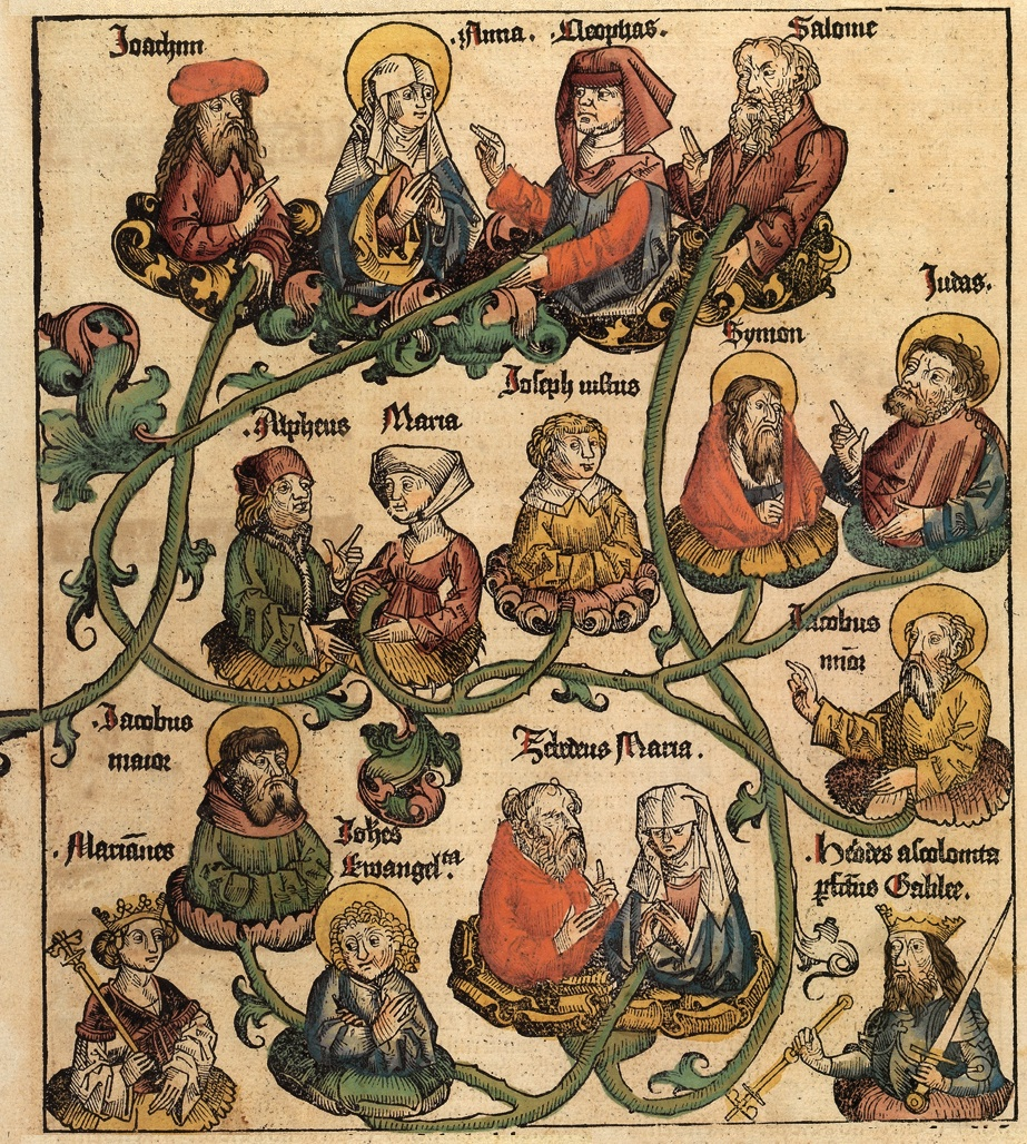 Retaille de la page 94-95